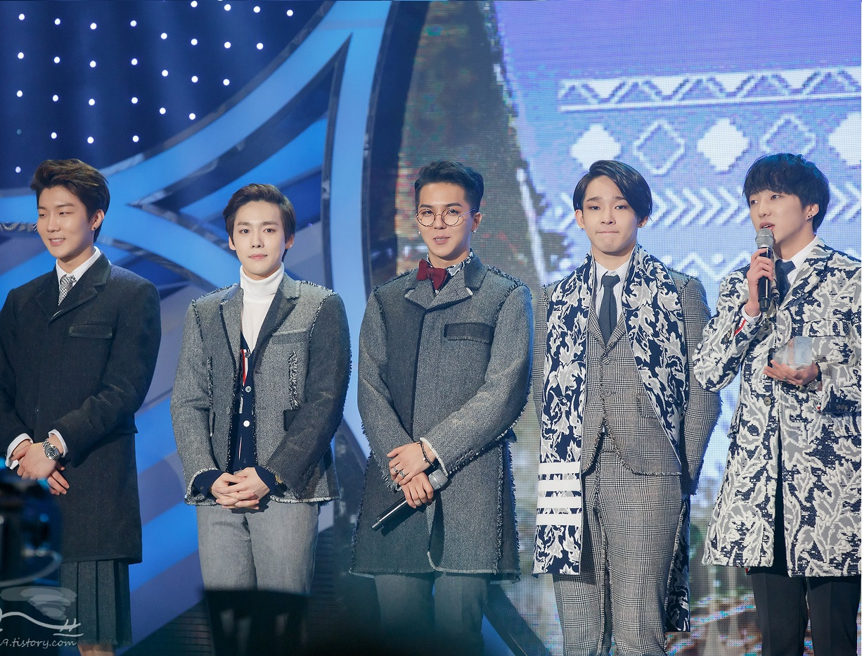 141113 위너